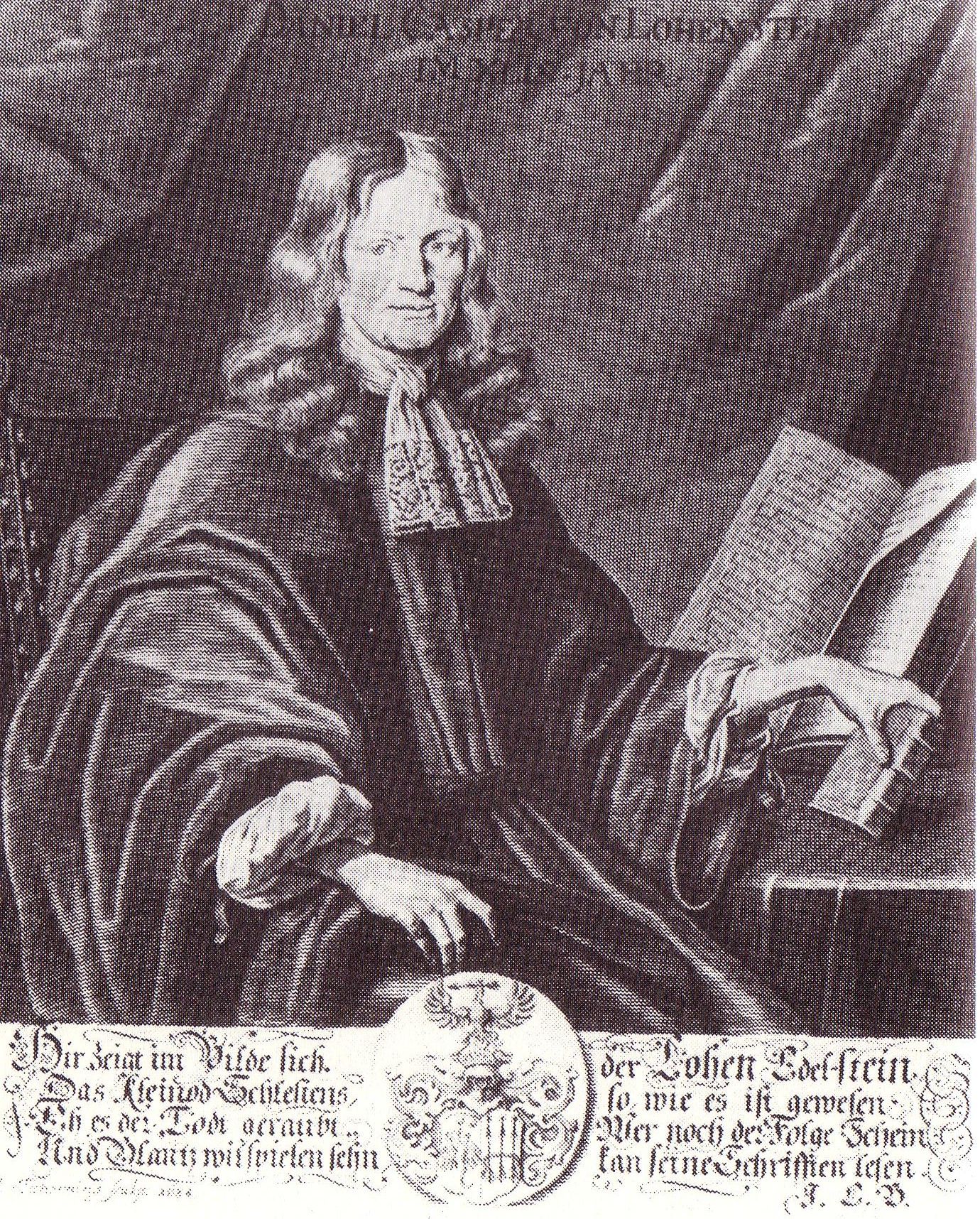 Daniel Casper von Lohenstein (1635-1683), silesian poet